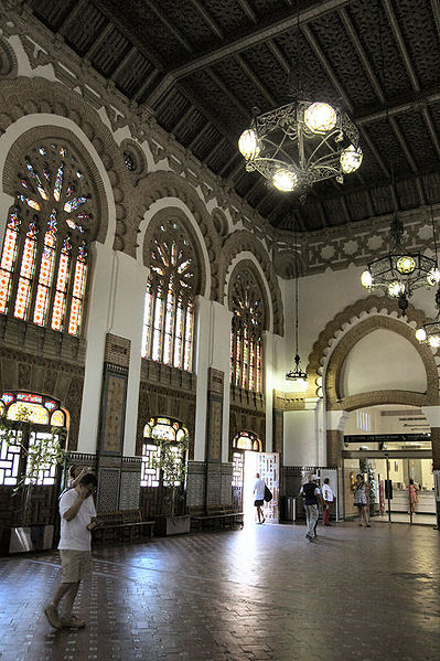 Interior de la estación de Toledo